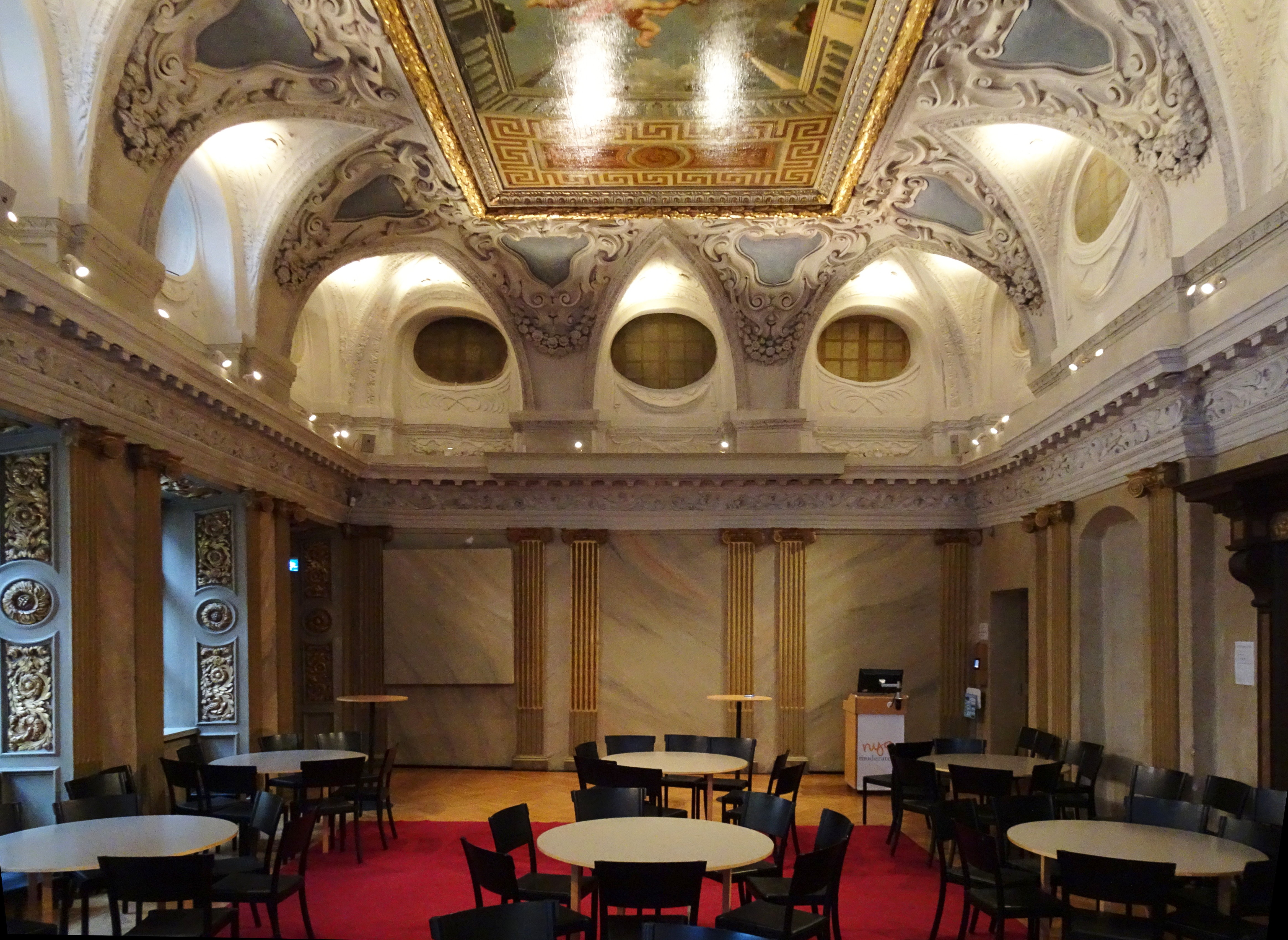 Schönfeldtska praktsalen i Schönfeldtska huset